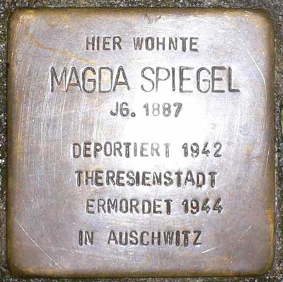 Stolperstein Holzhausenstrasse 16 für Magda Spiegel Freigabe [Ticket#2013102810006014] erteilt von Initiative Stolpersteine Frankfurt am Main e.V.